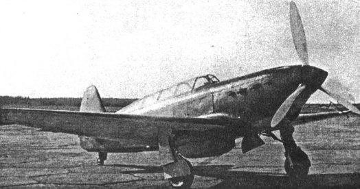 Первый опытный УТИ-26 в НИИ ВВС.